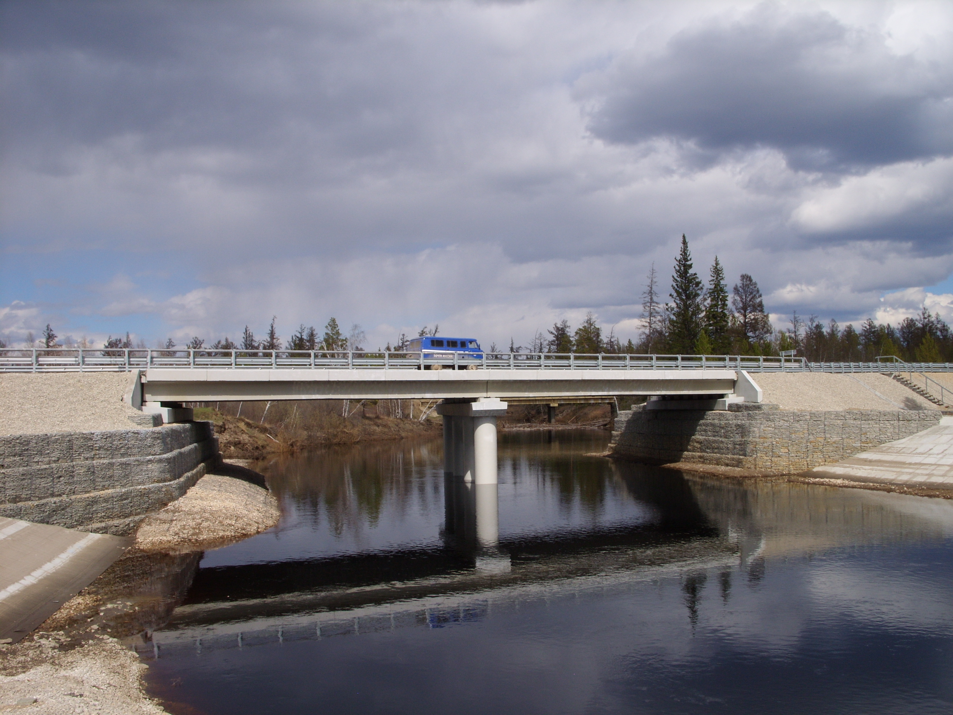 Возле автодорожного моста через р. Кенкеме на федеральной автодороге "Вилюй", 47 км к западу от Якутска